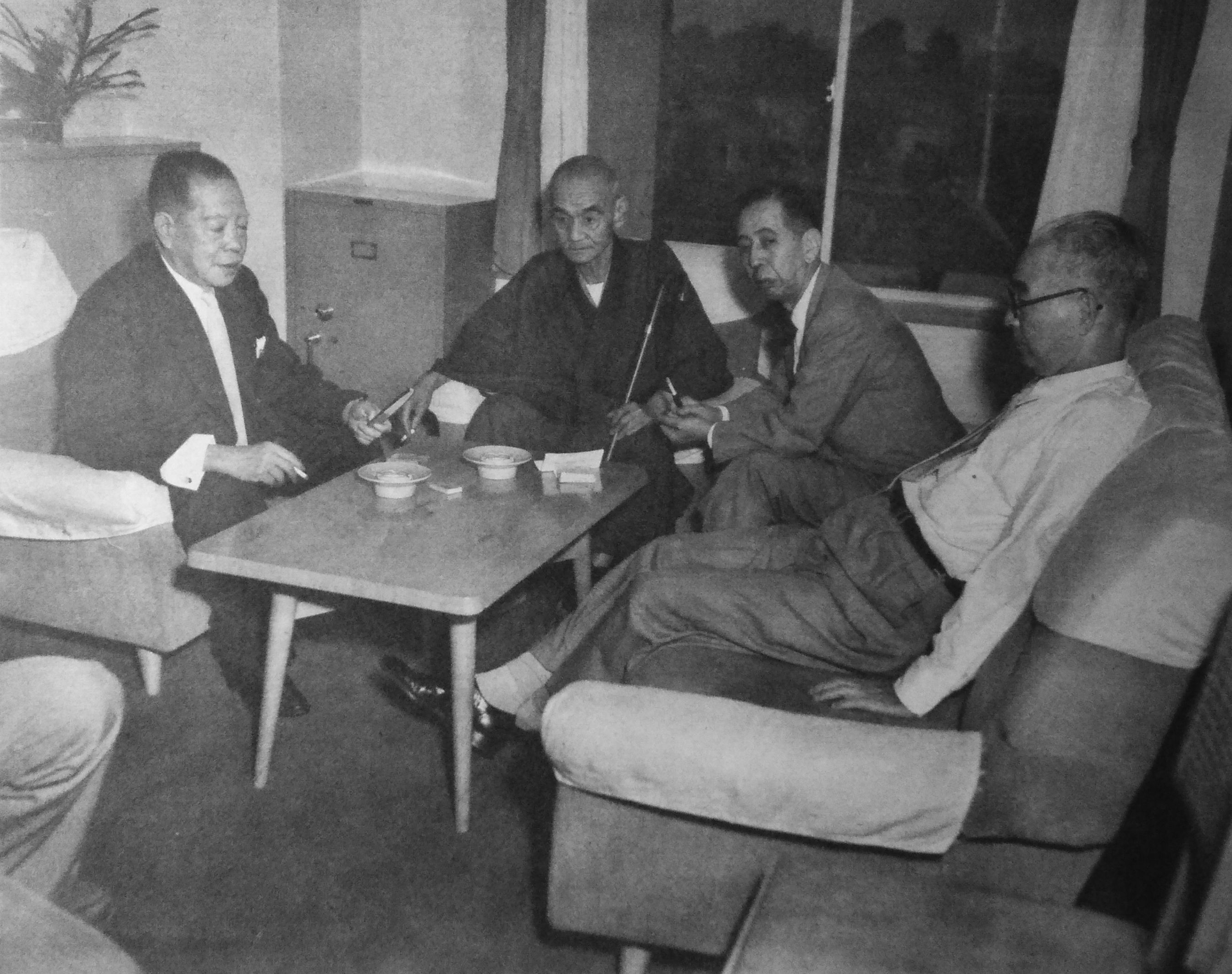 保守合同に向けて永田町グランドホテルで会合を開く日本民主党と自由党の指導部